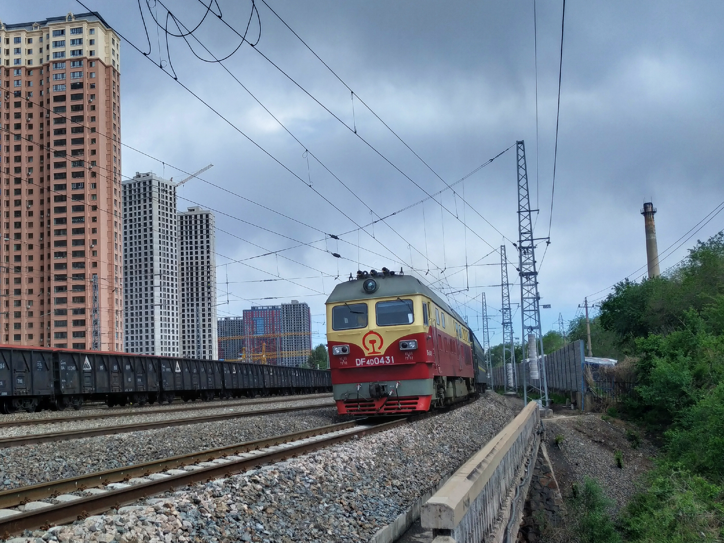 中文（中国大陆）: 6254行驶在三棵树铁路东门站段